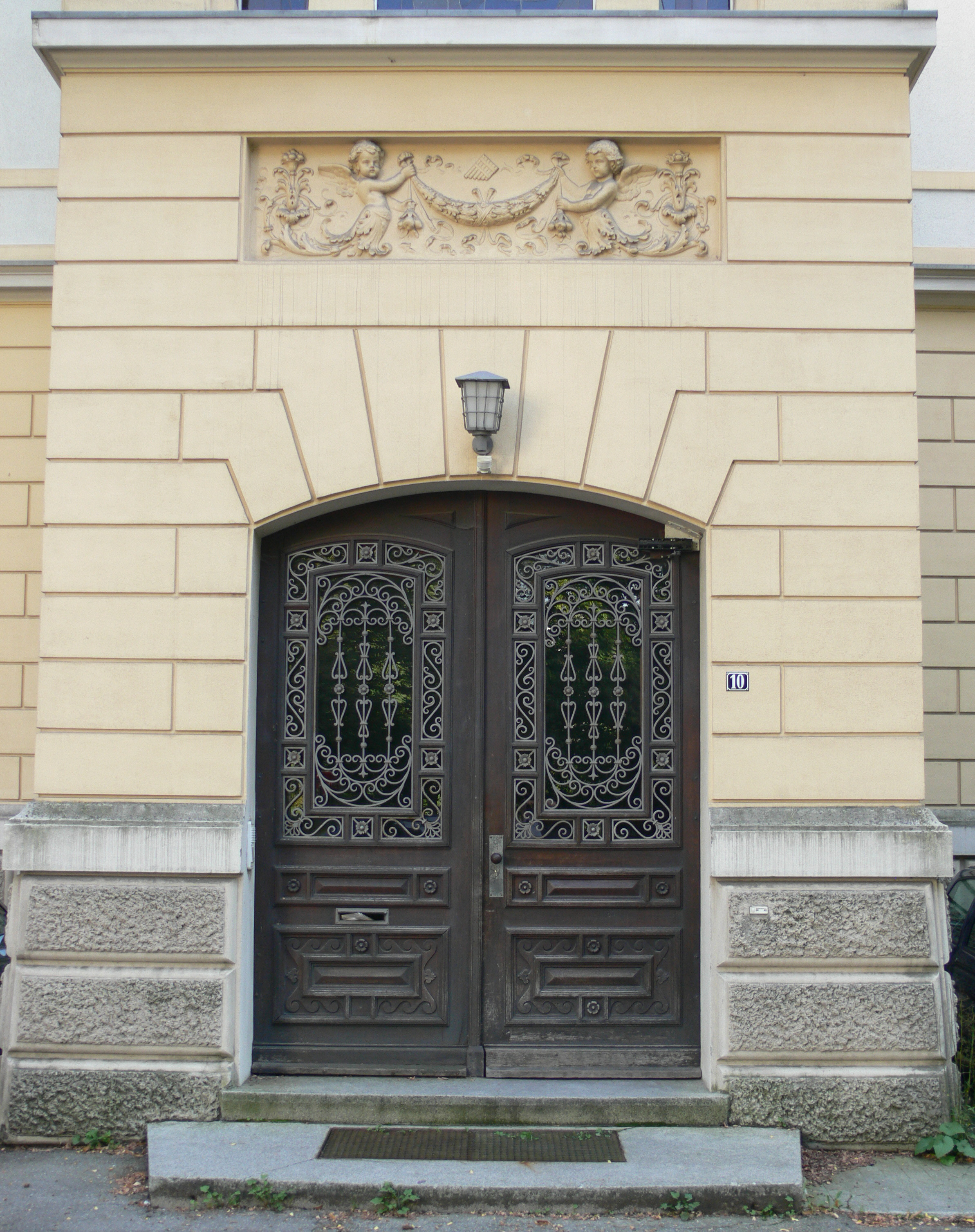 Nordportal des „Spohnschlössles“ in Ravensburg (ehem. Wohnhaus Julius Spohn, heute Teil des Welfengymnasiums)